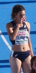 Młodzieżowe Mistrzostwa Europy w Lekkoatletyce U23 w Bydgoszczy 13-16 lipca 2017, siedmiobój kobiet; bieg na 200 m